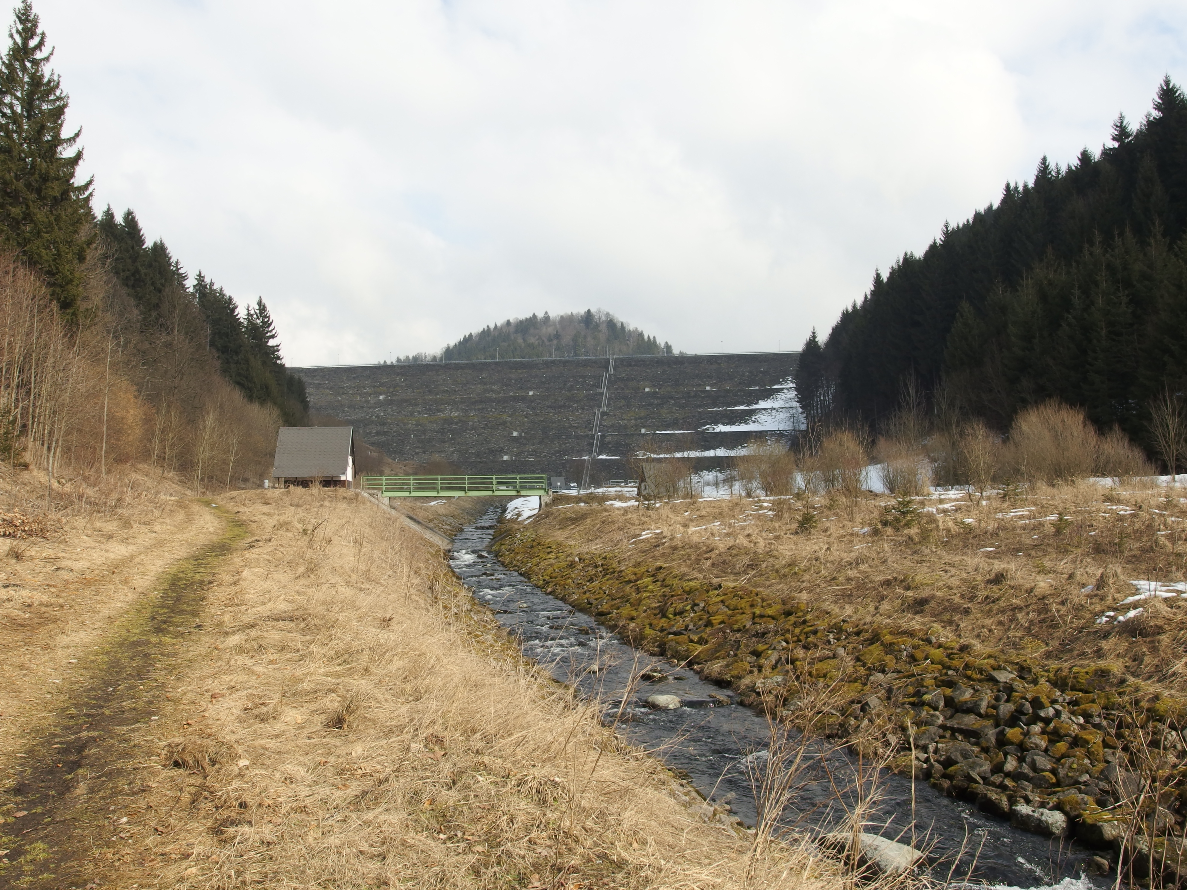 Turček - hrádza